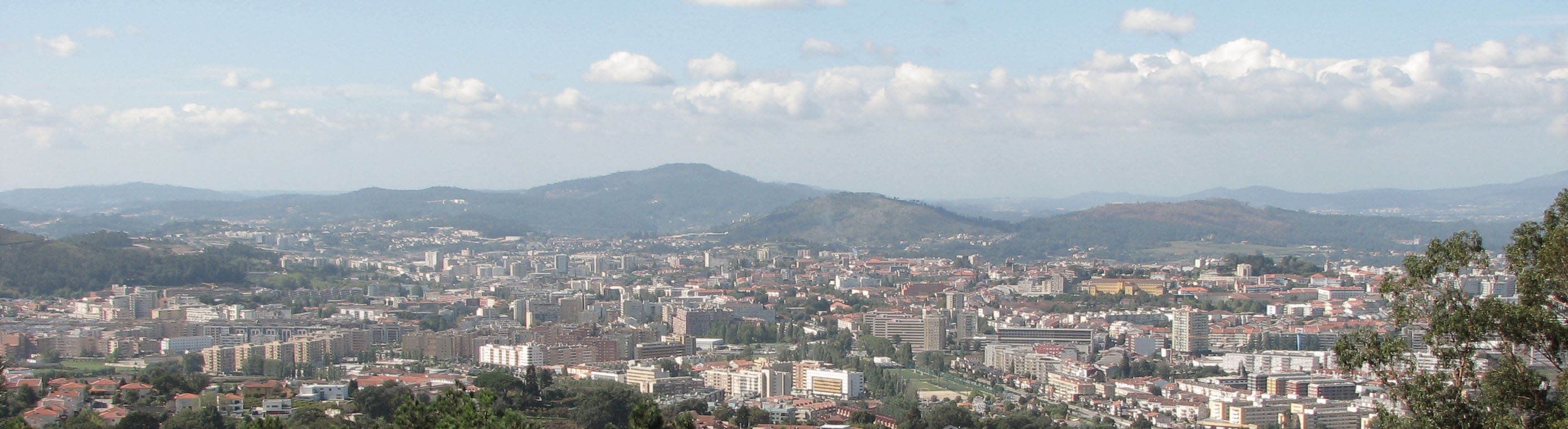 Vista da cidade de Braga no vale do Rio Este.